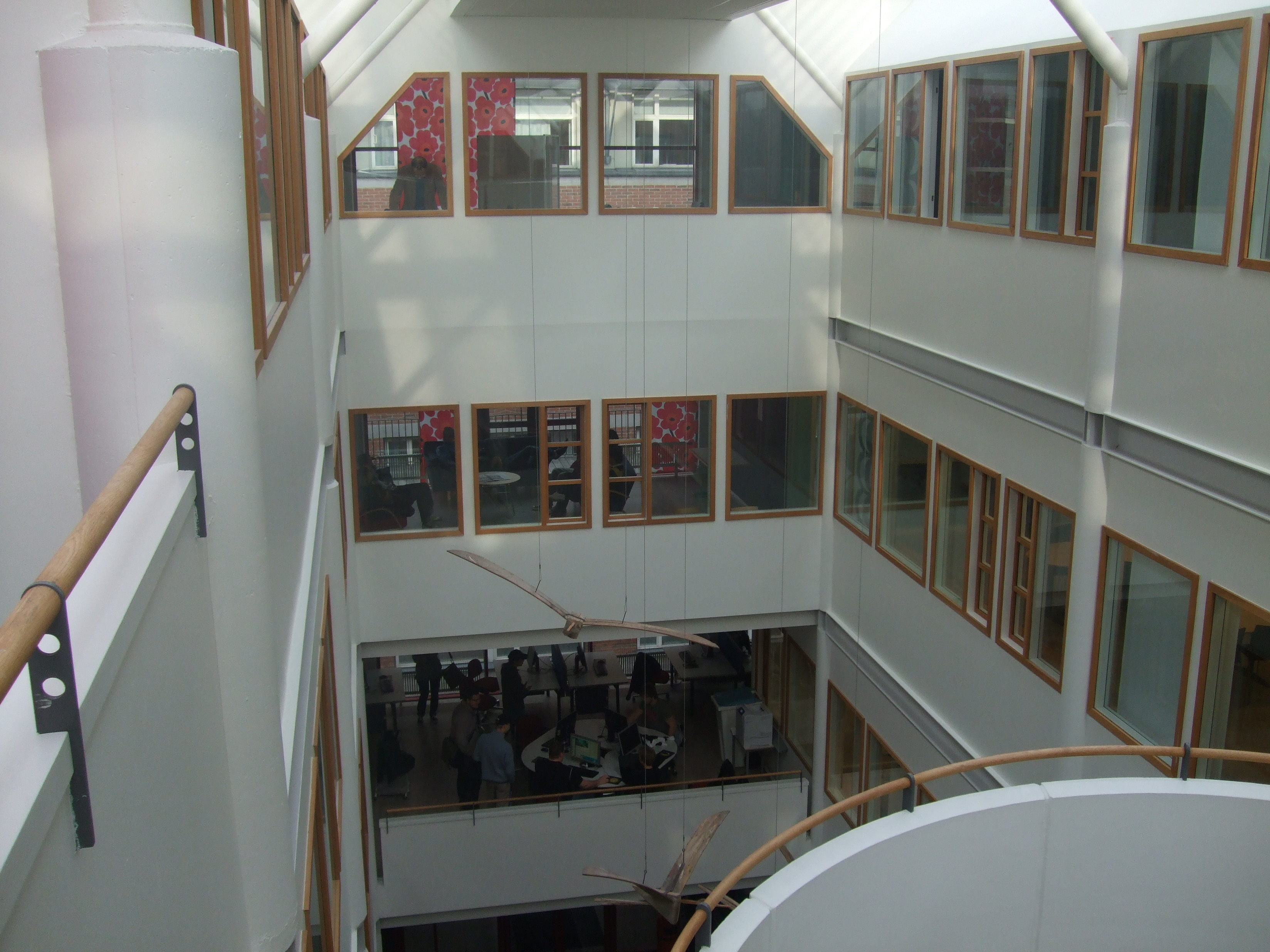 Mikael Elias Teoretiska Gymnasium på Lindholmen i Göteborg. Bilden är tagen från en ljusgård som omringas av skolan.